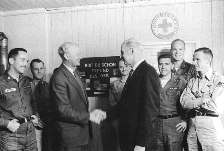 Zentralbild-Sturm 19.7.1958 Voigt-L USA-Hubschrauber-Besatzung rückgeführt. Acht Offiziere und ein Feldwebel der amerikansichen 3. Panzer-Division, die am 7. Juni 1958 von Westdeutschland aus in einem Hubschrauber widerrechtlich in das Gebiet der Deutschen Demokratischen Republik eingeflogen waren, sind am 19. Juli 1958 rückgeführt worden. Sie wurden vom Präsidenten des Deutschen Roten Kreuzes in der DDR, Dr. Werner Ludwig, dem Direktor des Amerikanischen Roten Kreuzes für Europa, Robert Storey W. am Grenzübergangspunkt Töpen übergeben. UBz.: US- (V.l.n.r.) Ludwig und Robert Wilson nach Abschluss der Übergabeformalitäten am Grenzübergang Töpen/Juchhöh.